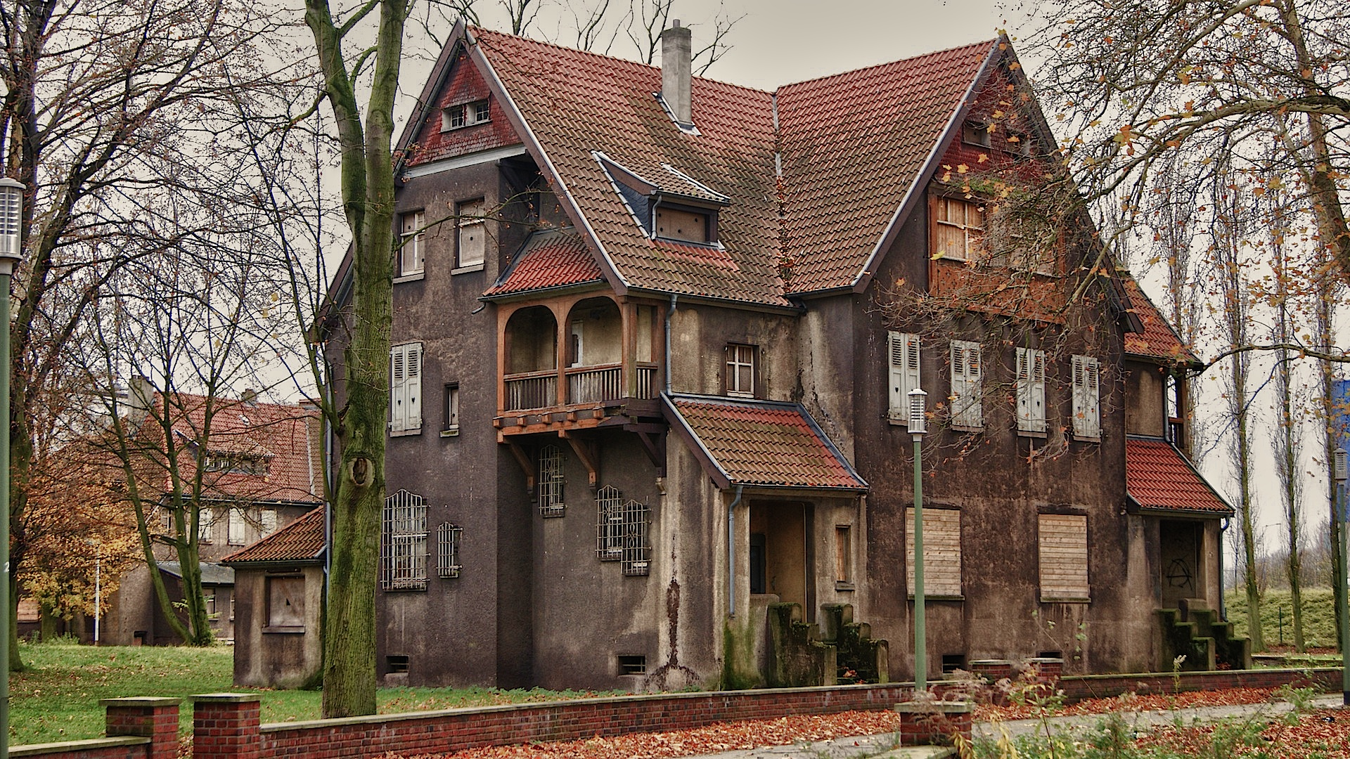 Eine der Duisburger "Krupp-Villen" im ehemaligen Bliersheim (heute Rheinhausen-Friemersheim). This image shows a heritage building in Germany, located in the North Rhine-Westphalian city Duisburg (no. 152).